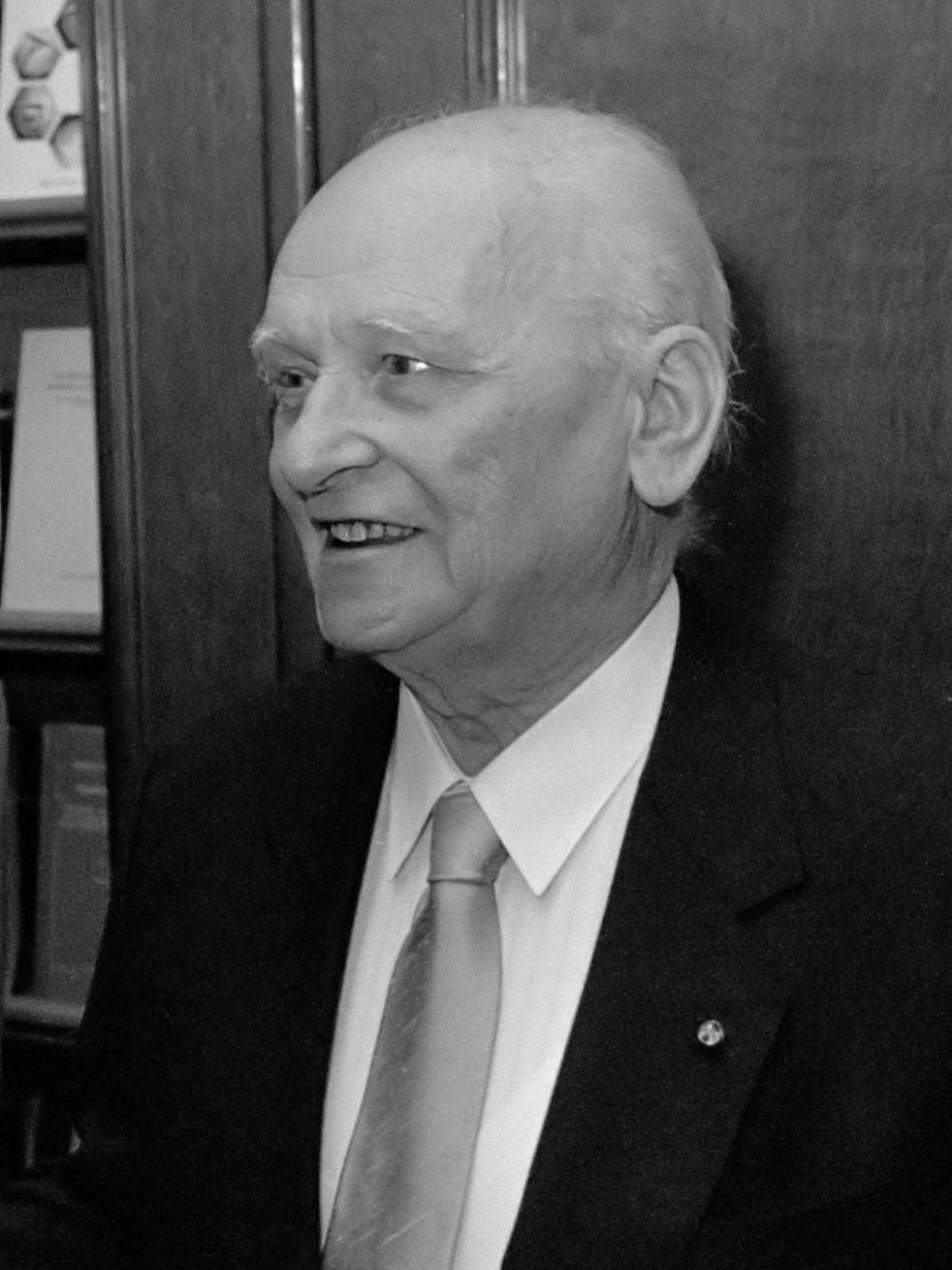 Eredoctoraten UvA; J. W. B. Polak en Charles B. Timmer 8 januari 1988